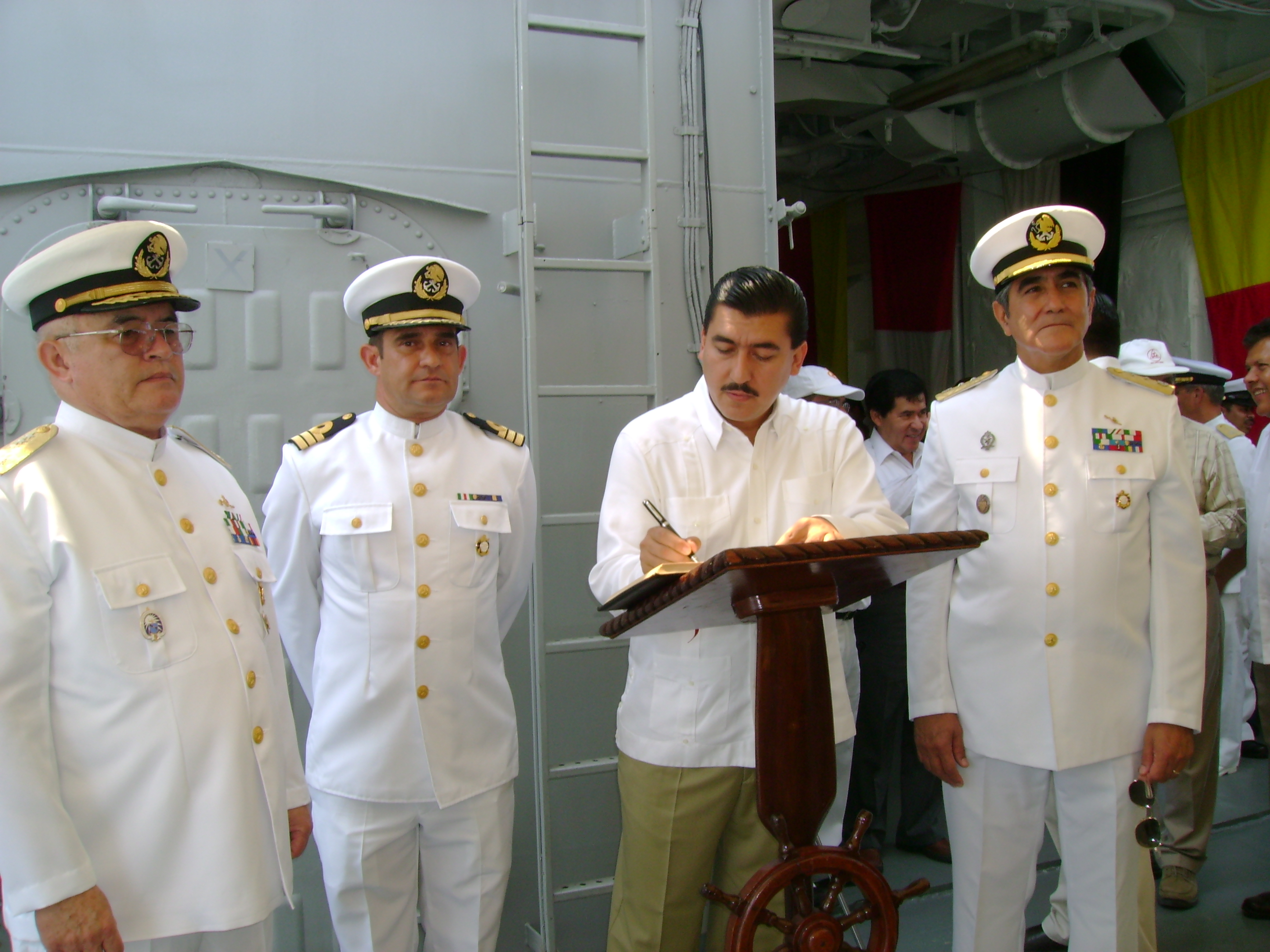 De izquierda a derecha, Almirante Néstor Evencio Yee Amador, Capitan Meugniot, el exgobernador de Colima Silverio Cavazos y el Almirante José Santiago Valdés Álvarez.